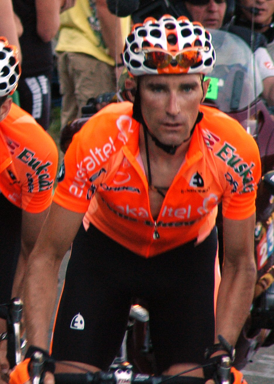 Inaki Isasi at stage 7 of the Tour de France 2007 on the Col de la Colombière.